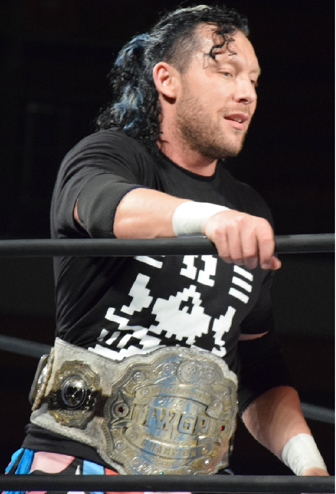 2016年5月29日 大阪市中央体育館・サブアリーナ 「BEST OF THE SUPER Jr.XXIII」 ケニー・オメガ